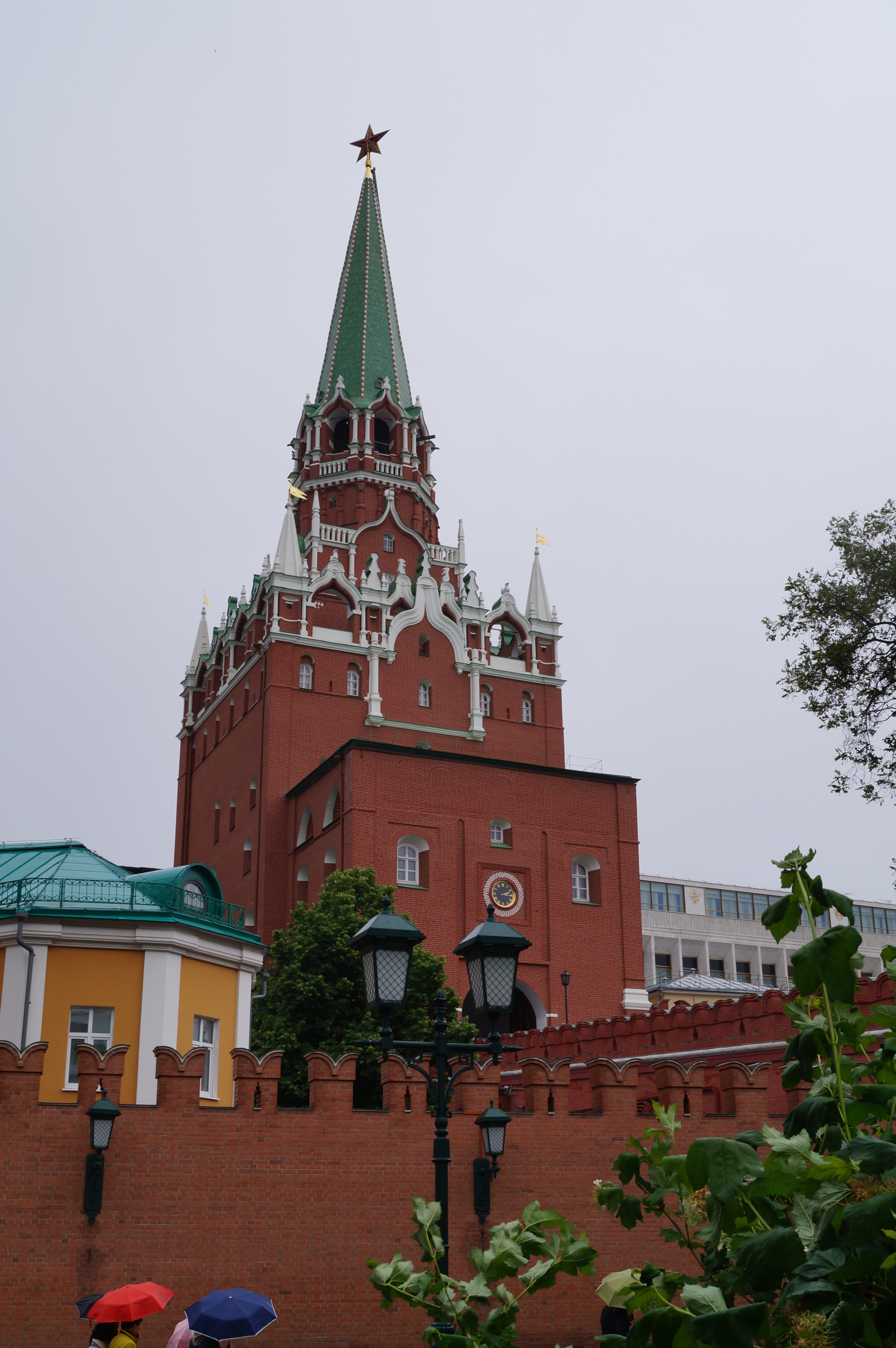 Троицкая башня: Тверской, Центральный округ, Москва